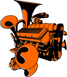 Logo von Moop Mama